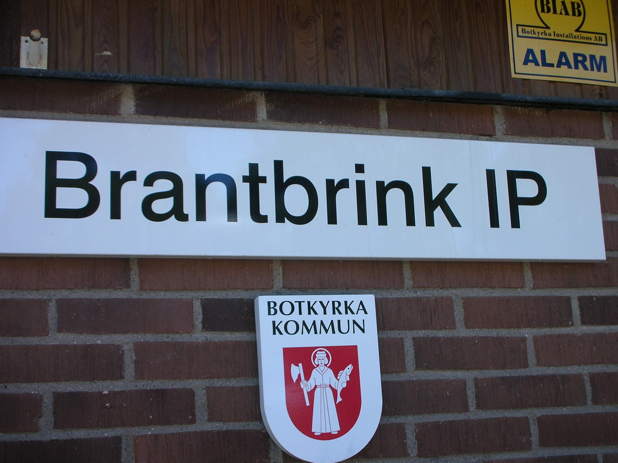 Skylt Brantbrinks IP